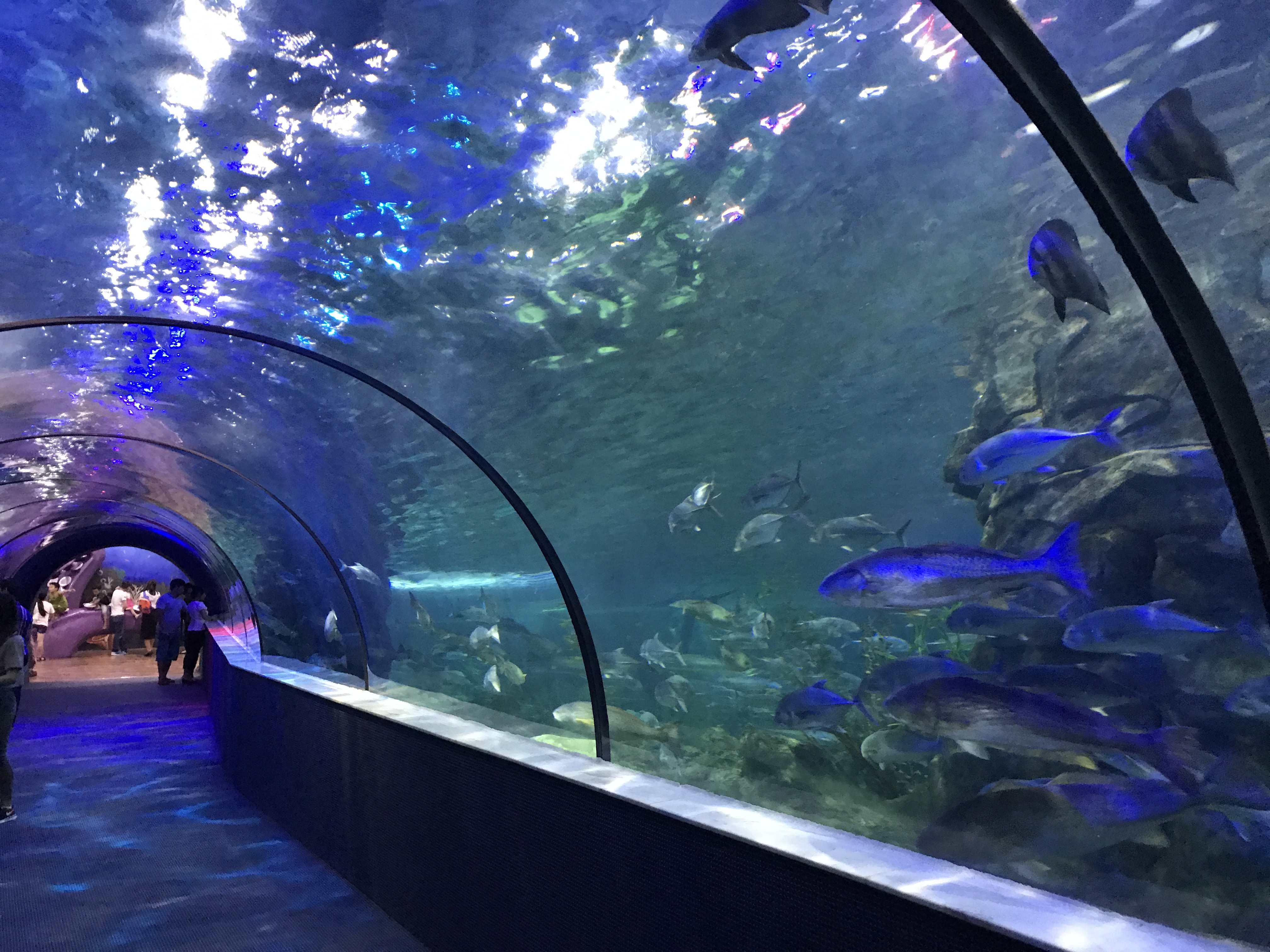 Thuỷ cung à Times City